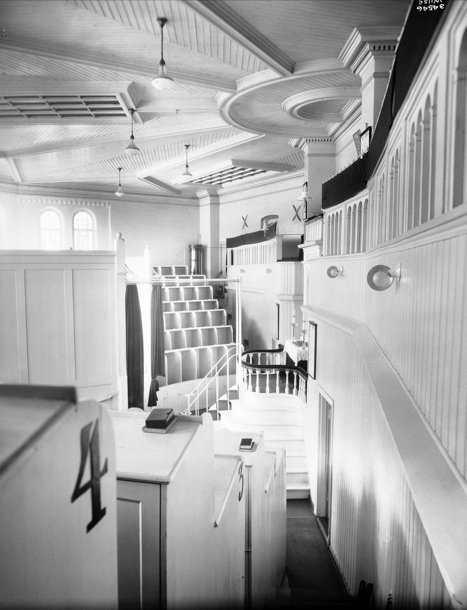 Interiør fra Botsfengselets kirke: Foto: Anders Beer Wilse, 1929. Fra Byhistorisk samling hos Oslo Museum.